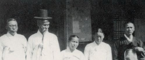 1946년 4월 29일 윤봉길 의사의 의거를 기념해 생전 그와 각별했던 김구(제일 왼쪽) 주석이 윤 의사의 가족과 함께했다. (왼쪽부터) 부친 윤황, 모친 김원상, 미망인 배용순, 아들 윤종(윤주경씨 부친).